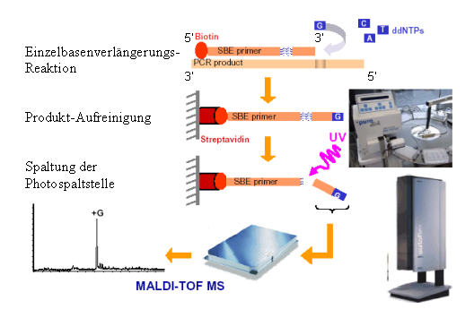 Schematische Darstellung der Single Base Extension